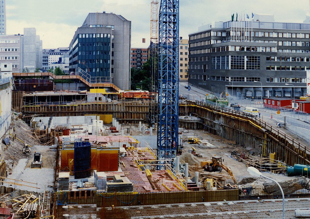 Mot söder över grundläggningsarbeten i kvarteret Fatburen för blivande Södermalms saluhall. 1989-1992 FOTOGRAF: Bergqvist, Stellan.BILDNUMMER: POSD 596Stadsmuseet i Stockholm